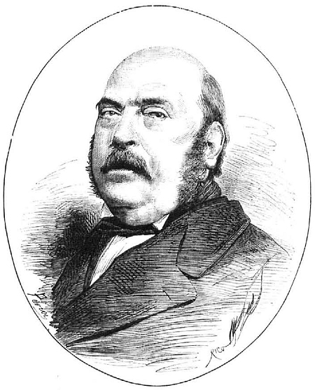 «Ilmo. Sr. D. Antonio Ferrer del Río», en la revista española La Ilustración Española y Americana.